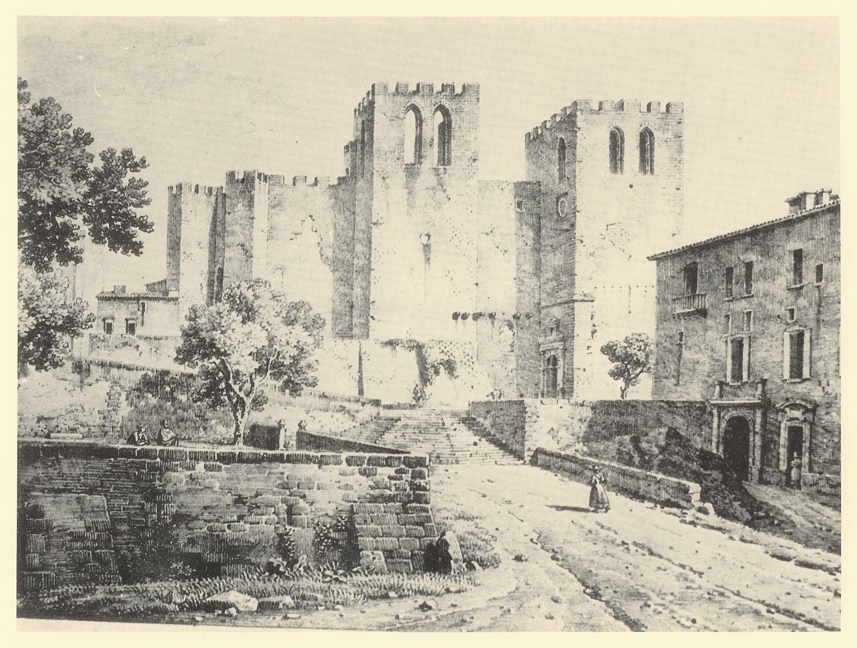 l'Abbaye de Saint-Victor de Marseille en fr:1818. Lithographie de C. de Last (25 × 35 cm) Bibliothèque des Amis de Saint-Victor